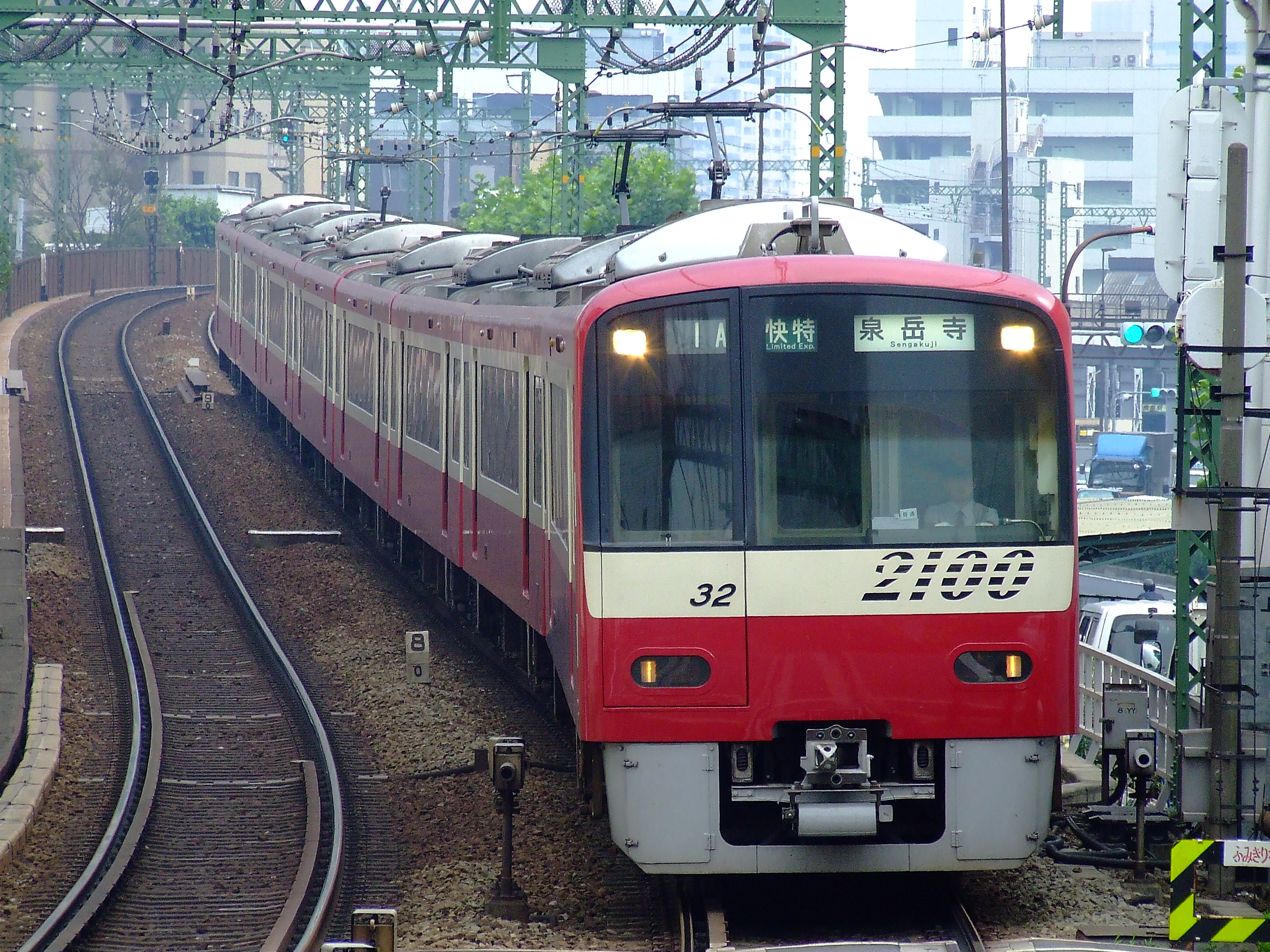 京浜急行電鉄2100形電車 新馬場～北品川間にて